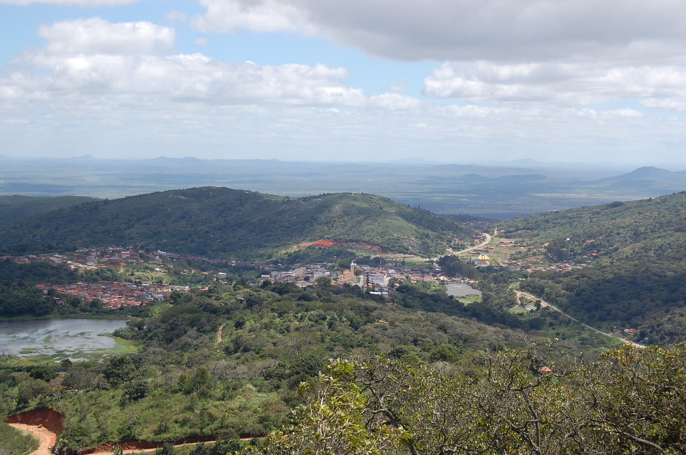 Vista de Taquaritinga do Norte, Pernambuco, Brasil.